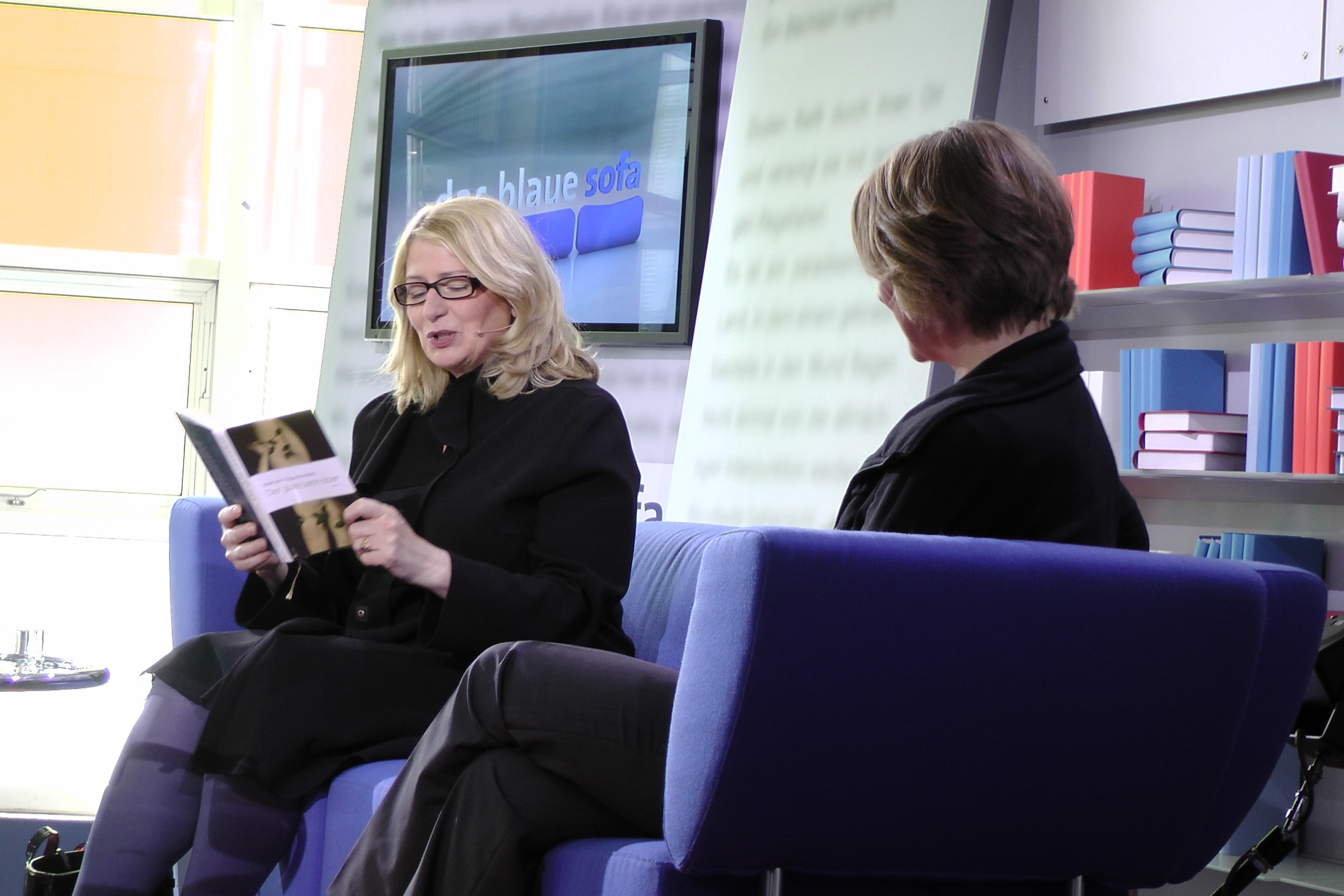 Nur für redaktionelle Nutzung / Editorial use only. Dieses Foto dürfen Sie honorarfrei nutzen, wenn Sie folgenden credit beachten: Copyright: Das blaue Sofa / Club Bertelsmann. Steinunn Sigurdardóttir studierte Psychologie und Philosophie am University College in Dublin und hat viele Jahre für das isländische Radio und Fernsehen gearbeitet. Mit ihrem ersten Gedichtband „Sífellur“ veröffentlichte sie im Alter von 19 Jahren. 1995 erhielt sie den Isländischen Literaturpreis. International wurde sie durch ihre Romane „Der Zeitdieb“ und „Herzort“ bekannt. Ihr Bestseller „Der Zeitdieb“ wurde mit Emmanuelle Béart und Sandrine Bonnaire in den Hauptrollen in Frankreich verfilmt. Sigurdardottir hat an unterschiedlichen Orten in Europa, den USA und Japan gelebt. Heute pendelt sie zwischen Reykjavík und Berlin.